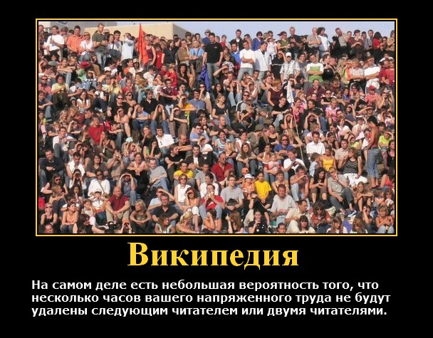 Демотиватор, перевод (оригинал в общественном достоянии - PD)